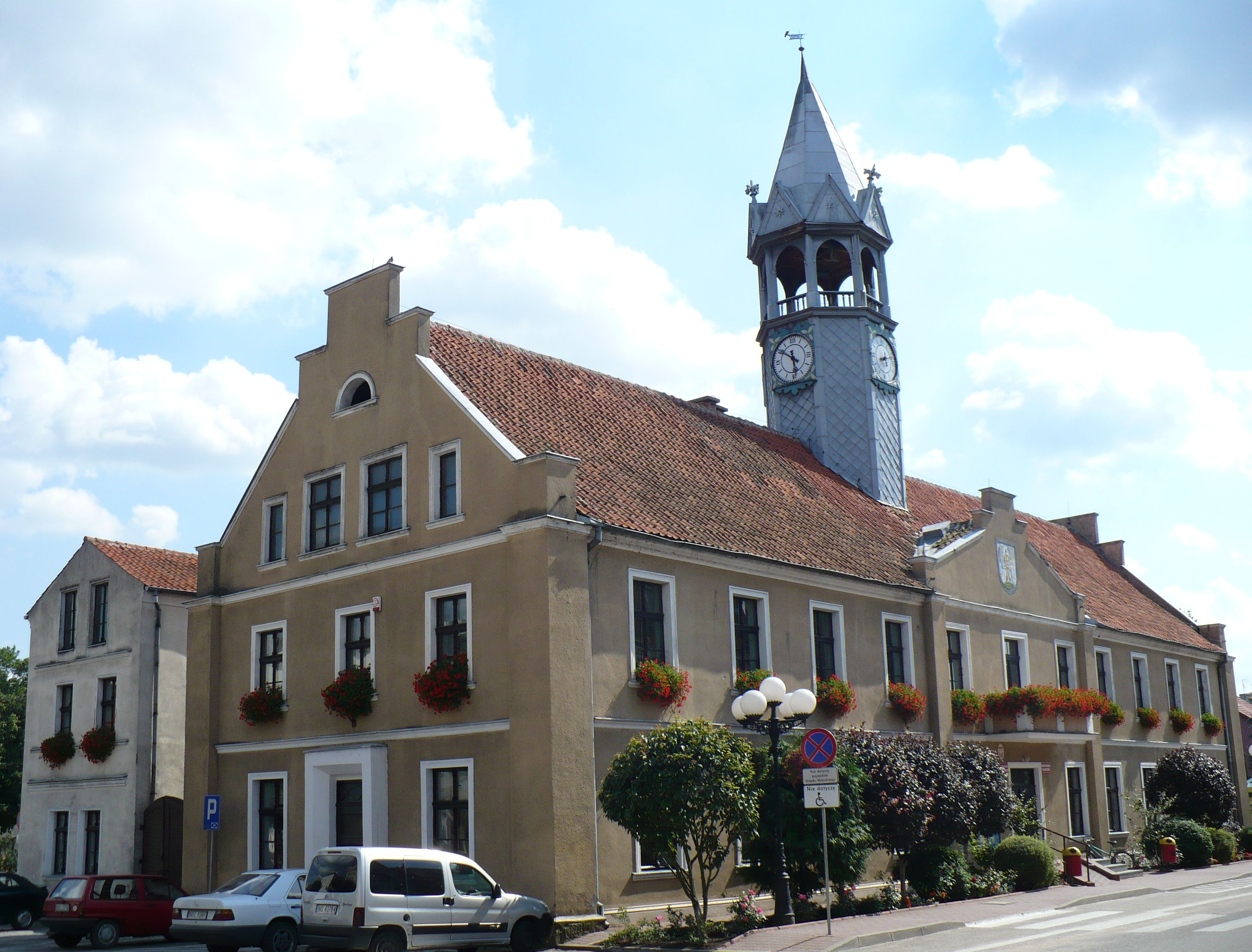 XIX wieczny neogotycki ratusz miejski w Barczewie